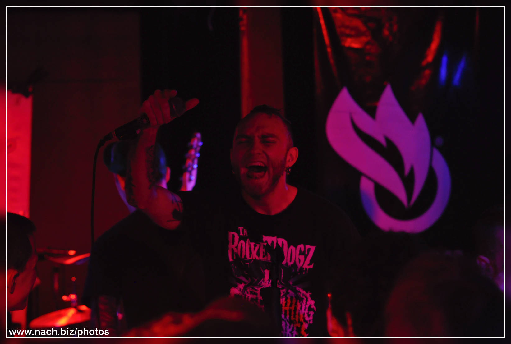 Vojta Kalina (Pipes and Pints) in Aligre-Gare de Lyon, Paris, Ile-de-France, FR